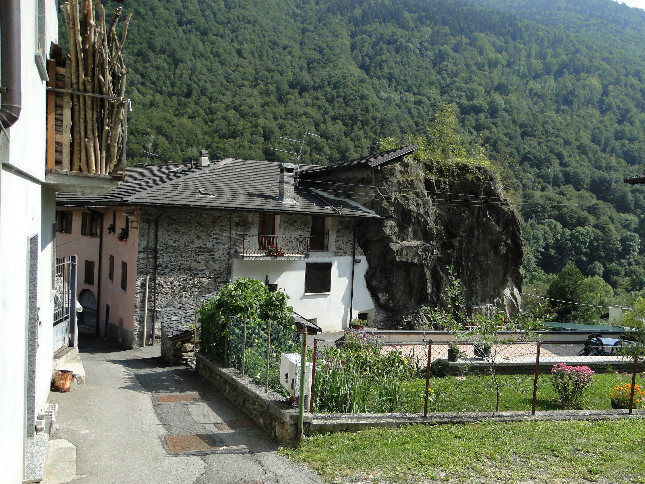 Casa costruita su roccia. Fiumenero, fraz. di Valbondione. Valle Seriana (BG)